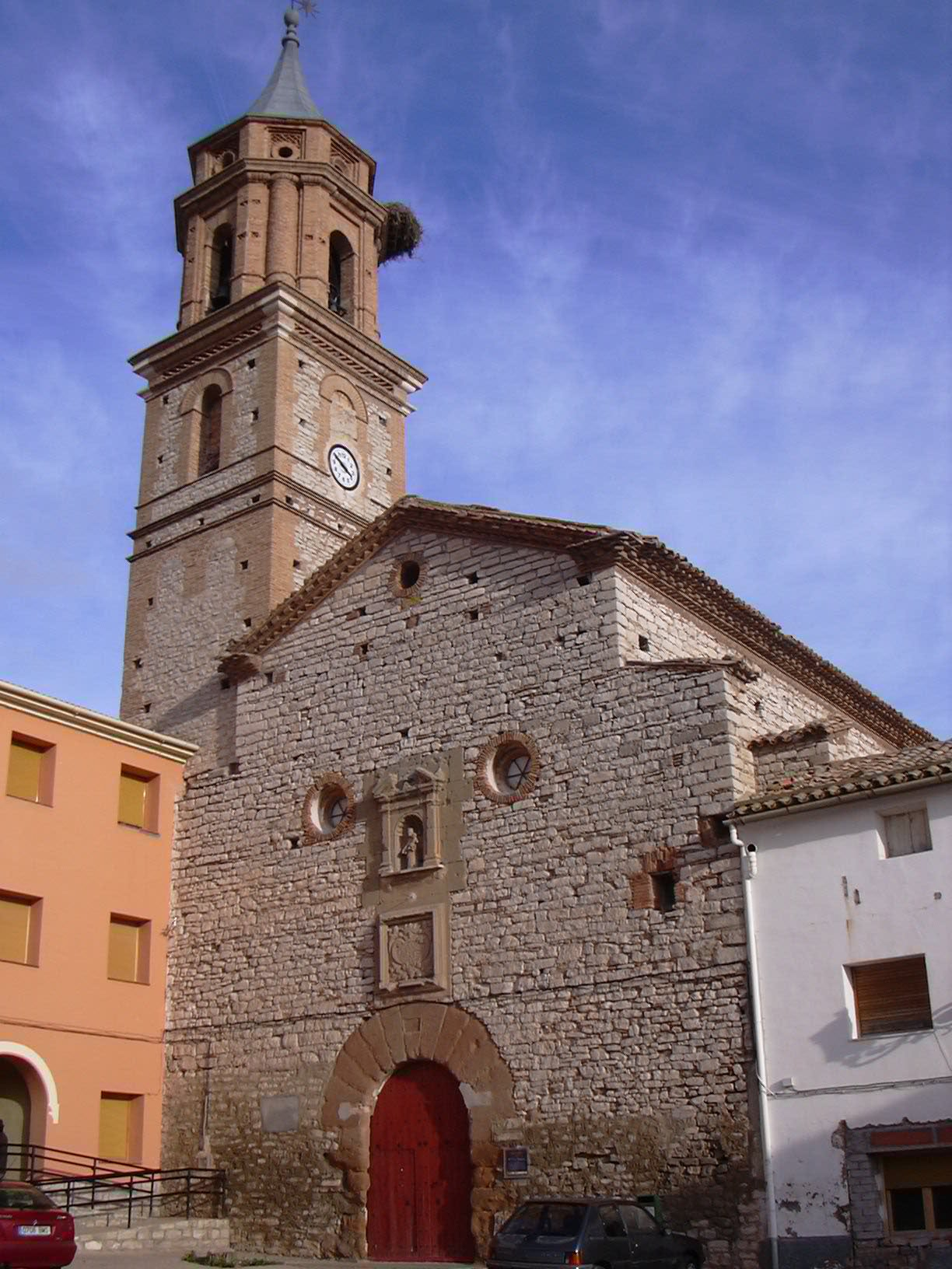 Azaila - Iglesia parroquial